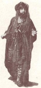 Alexandre Nolla (nascut a Gràcia) en el paper de Mandoni en l'obra de Guimerà "Indibil i Mandoni".